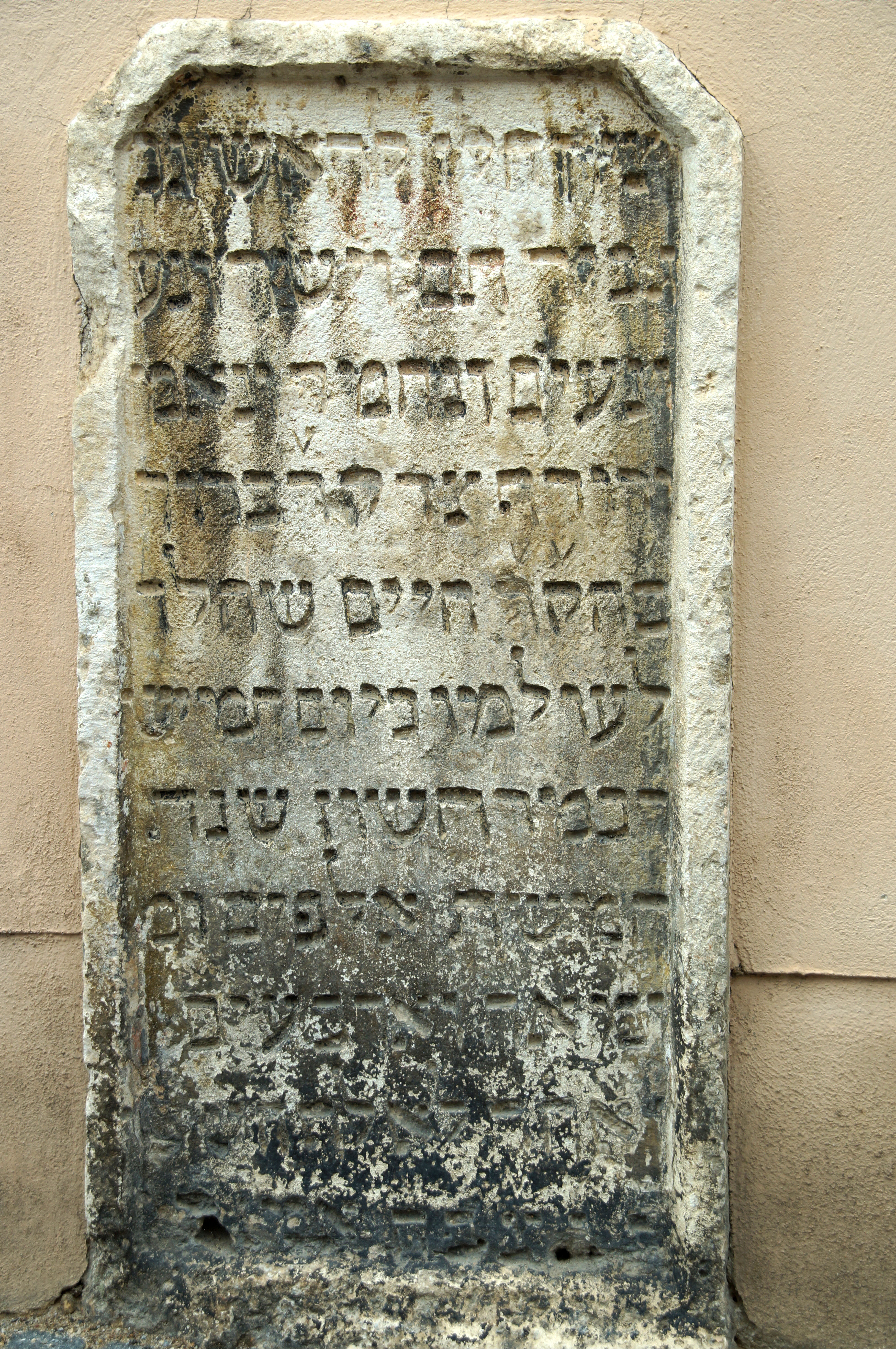 Jüdischer Grabstein des Rabbi Baruch, Kalkstein, 1380; 1519 vom jüdischen Friedhof hierher verschlepptThis is a photograph of an architectural monument.